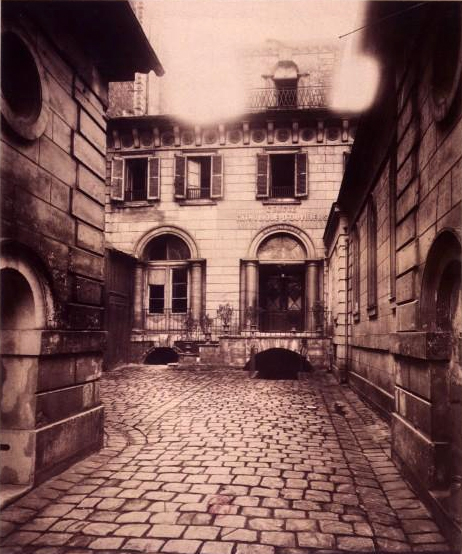 Maison où pris naissance le premier Cercle Catholique ouvrier à Paris en 1865, 14e arr. Maison démolie en 1907. Photographie de Eugène Atget